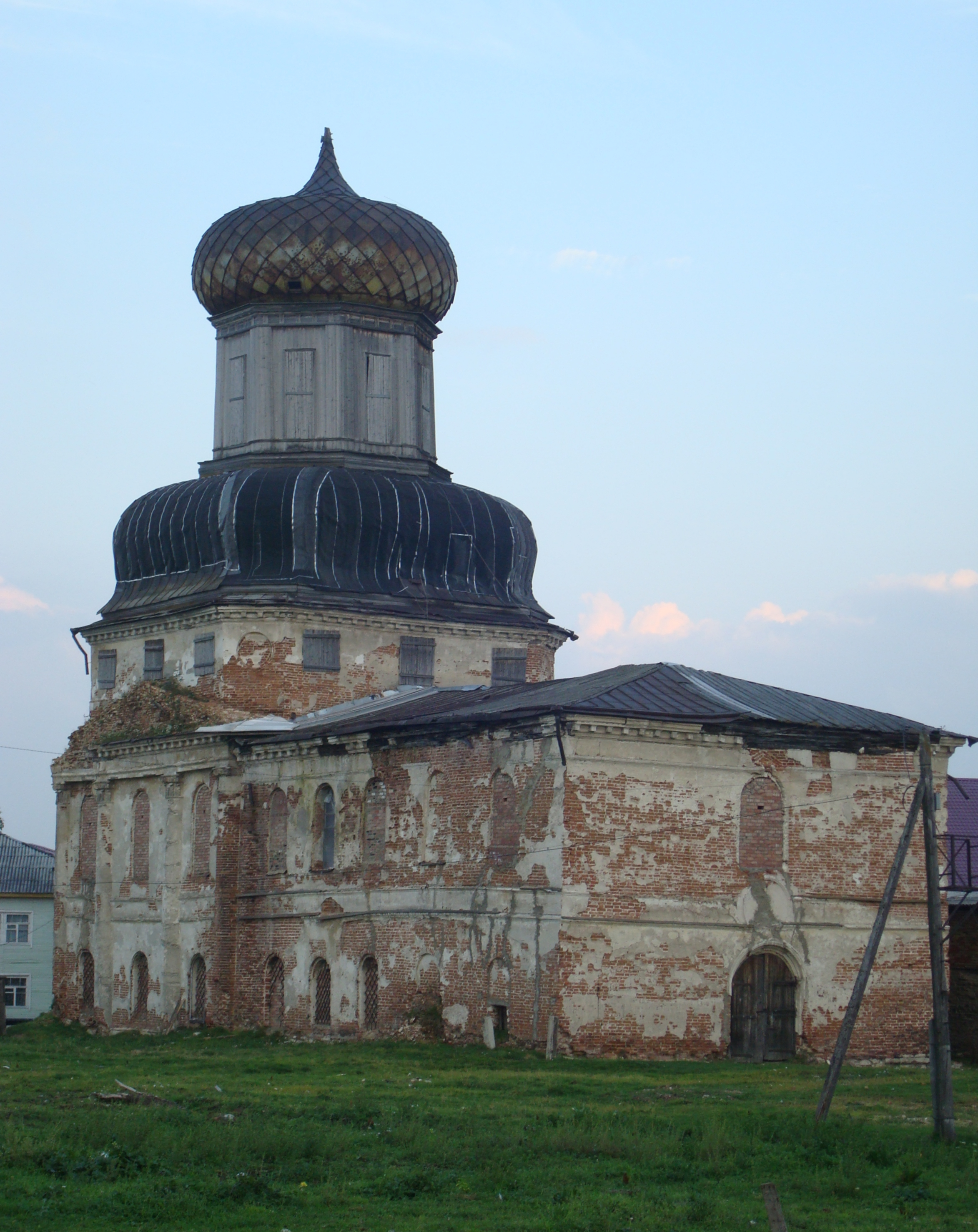 Kirche in Ischma (Ижма), Republik Komi, Russische FöderationTemplate:Cultural heritage Russia